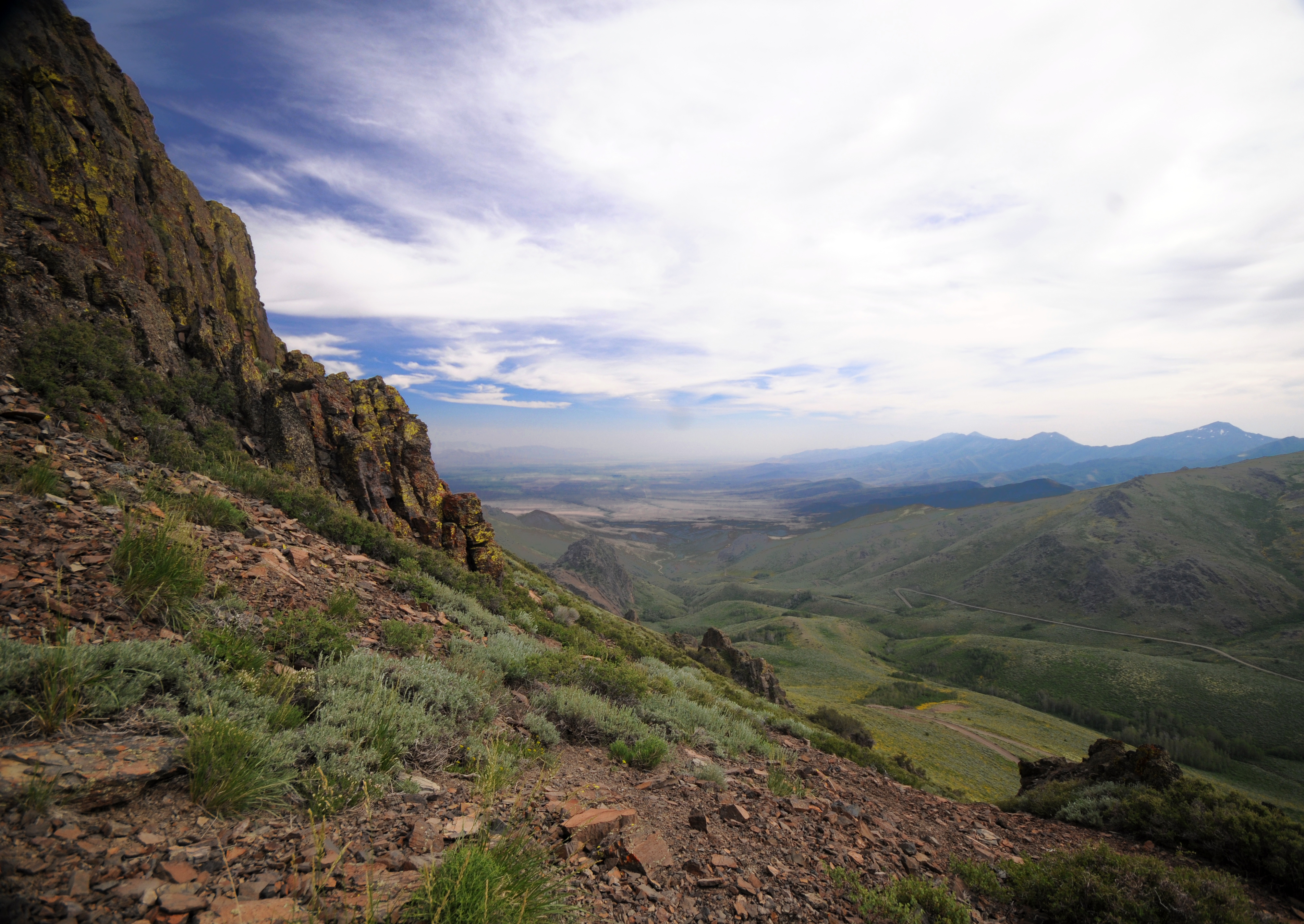 Santa Rosa Range, NV 2008